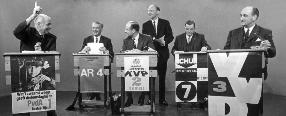 Verkiezingsdebat op televisie met vlnr de fractieleiders Nederhorst, Roelvink, Schmelzer, interviewer Ferry Hoogendijk, Beernink en Toxopeus in AVRO's Televizier, 22 maart 1966.